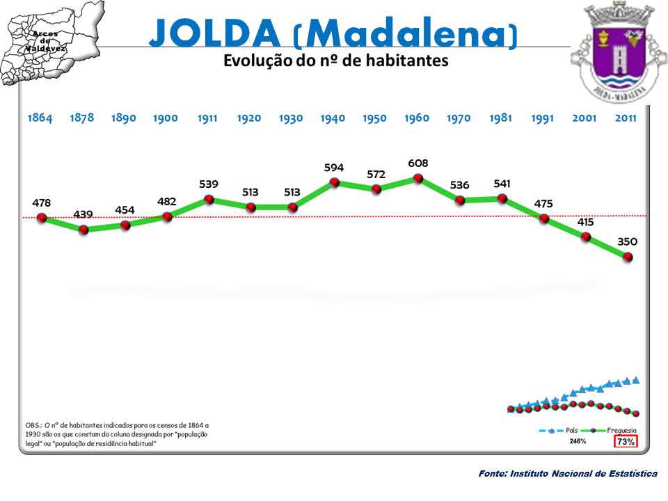 Censos 1864/2011